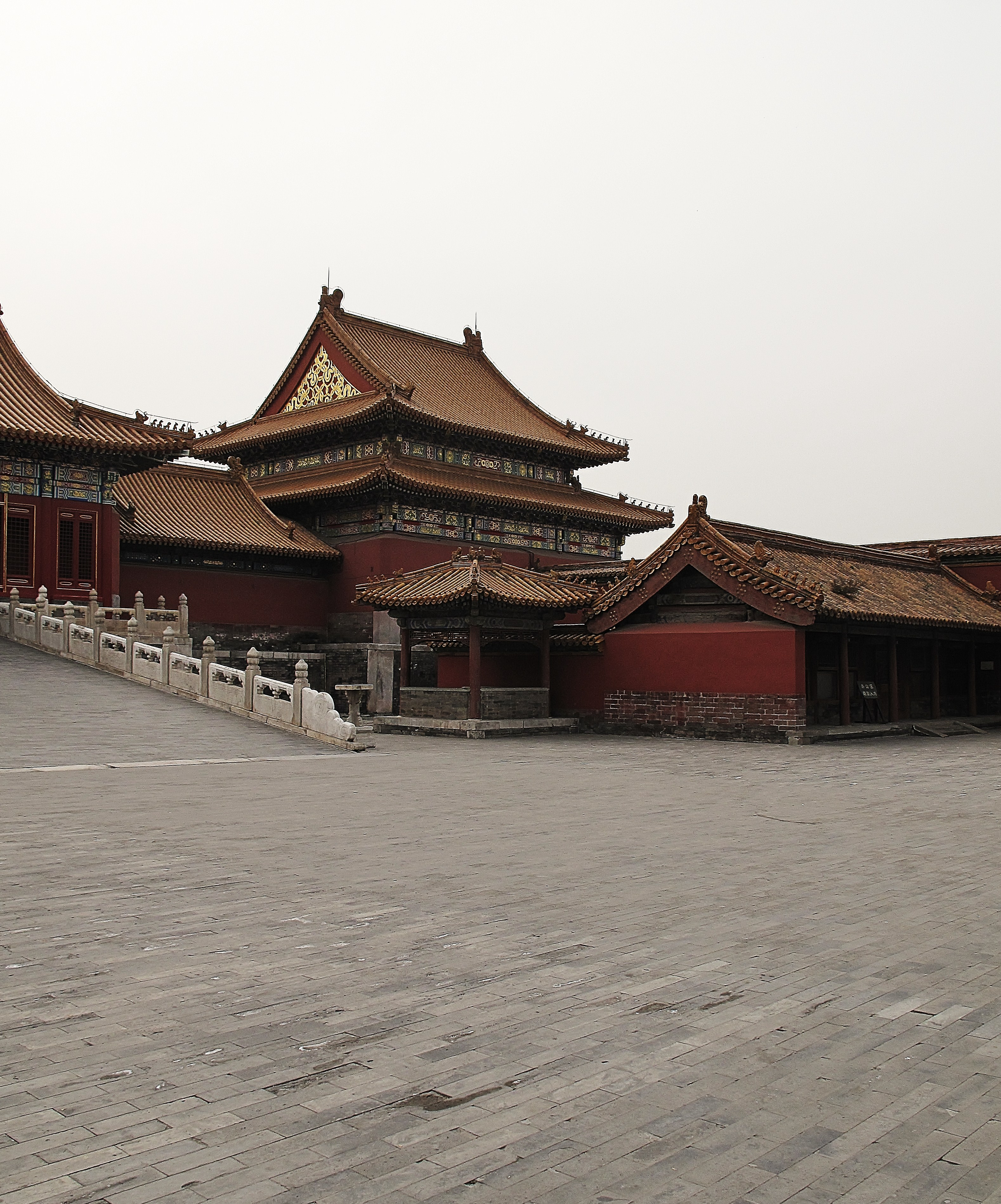 More Forbidden City